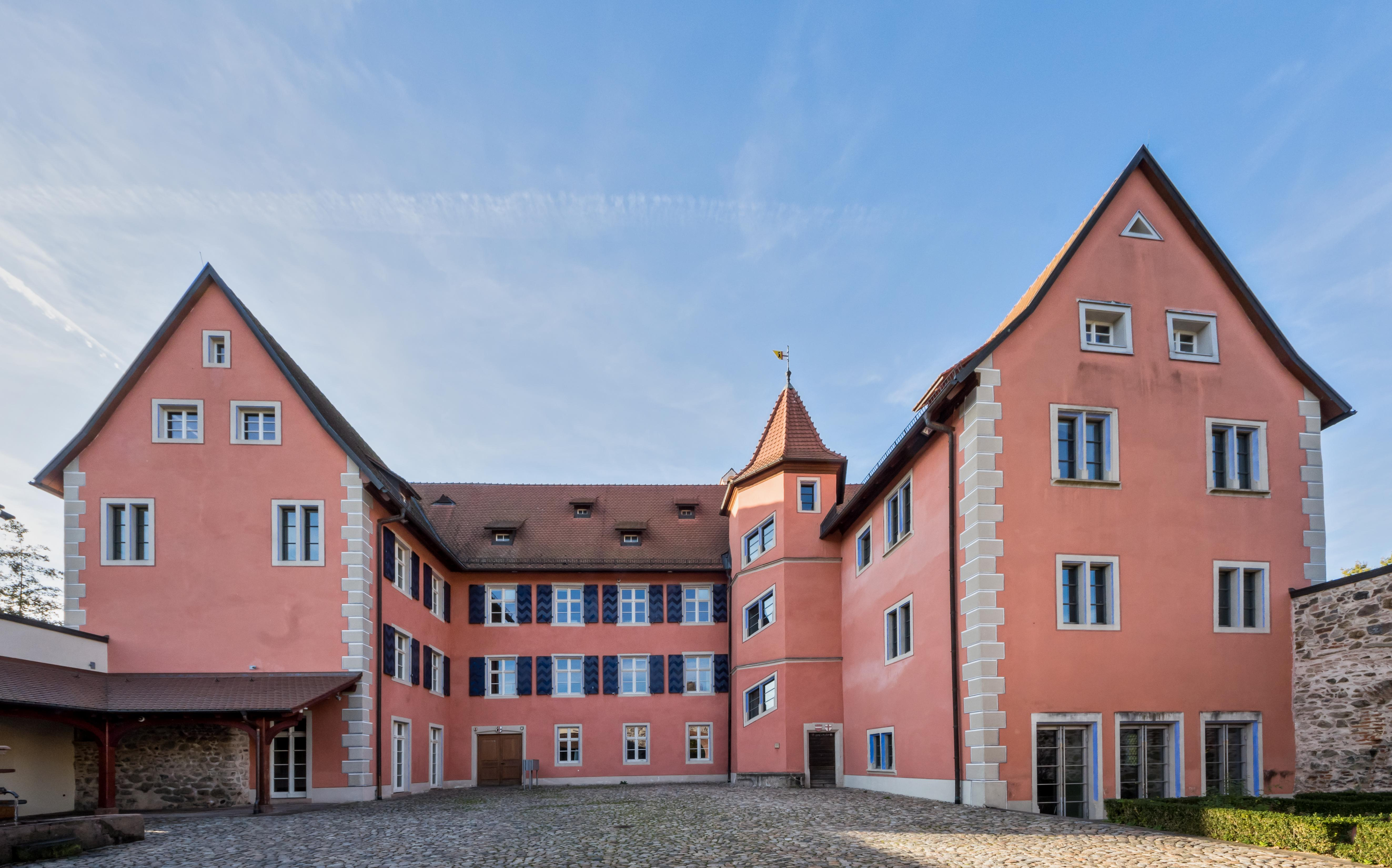 Bilder aus Kirchzarten Talvogtei